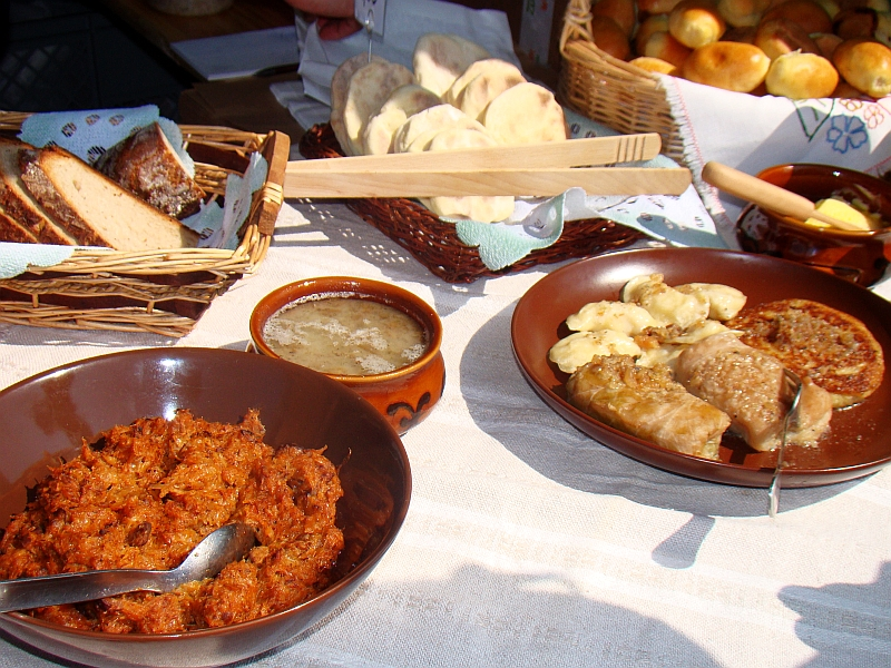 Die Ikonen der zeitgenössischen Volkskunst in Sanok.